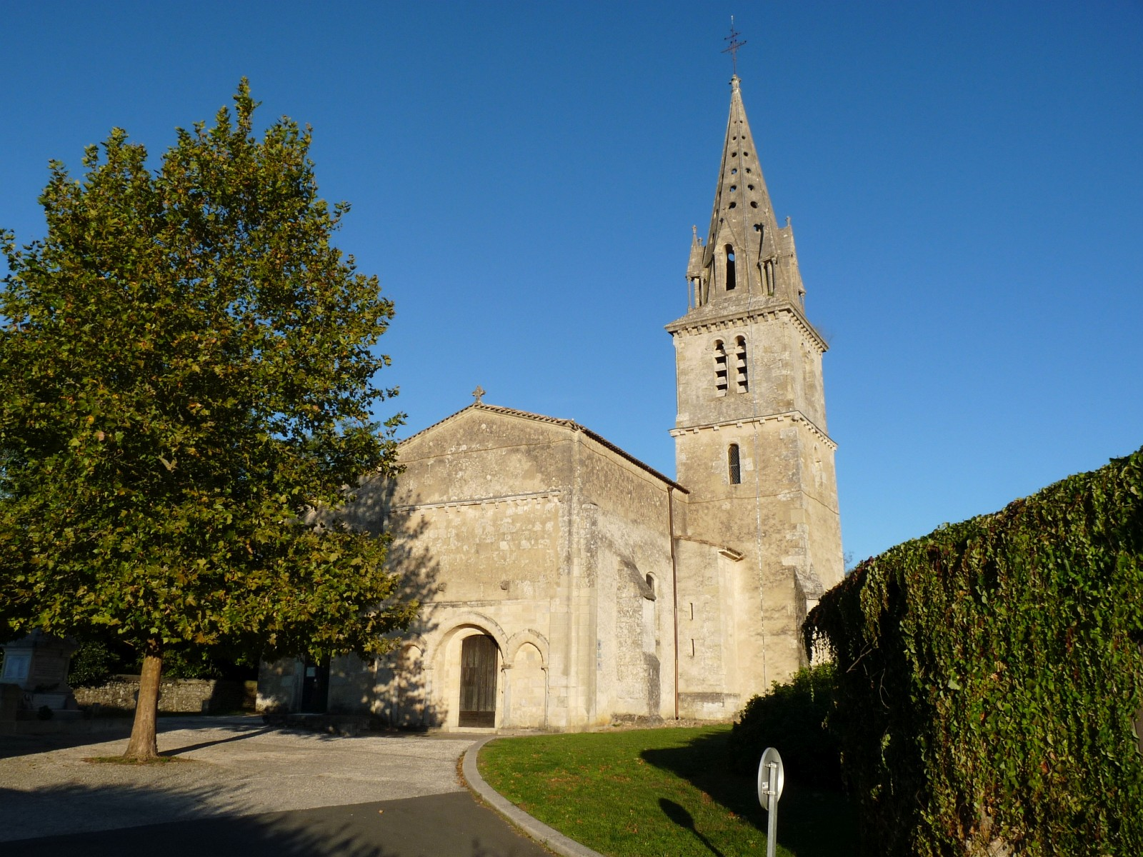 Eglise de Cartelègue, Gironde, France